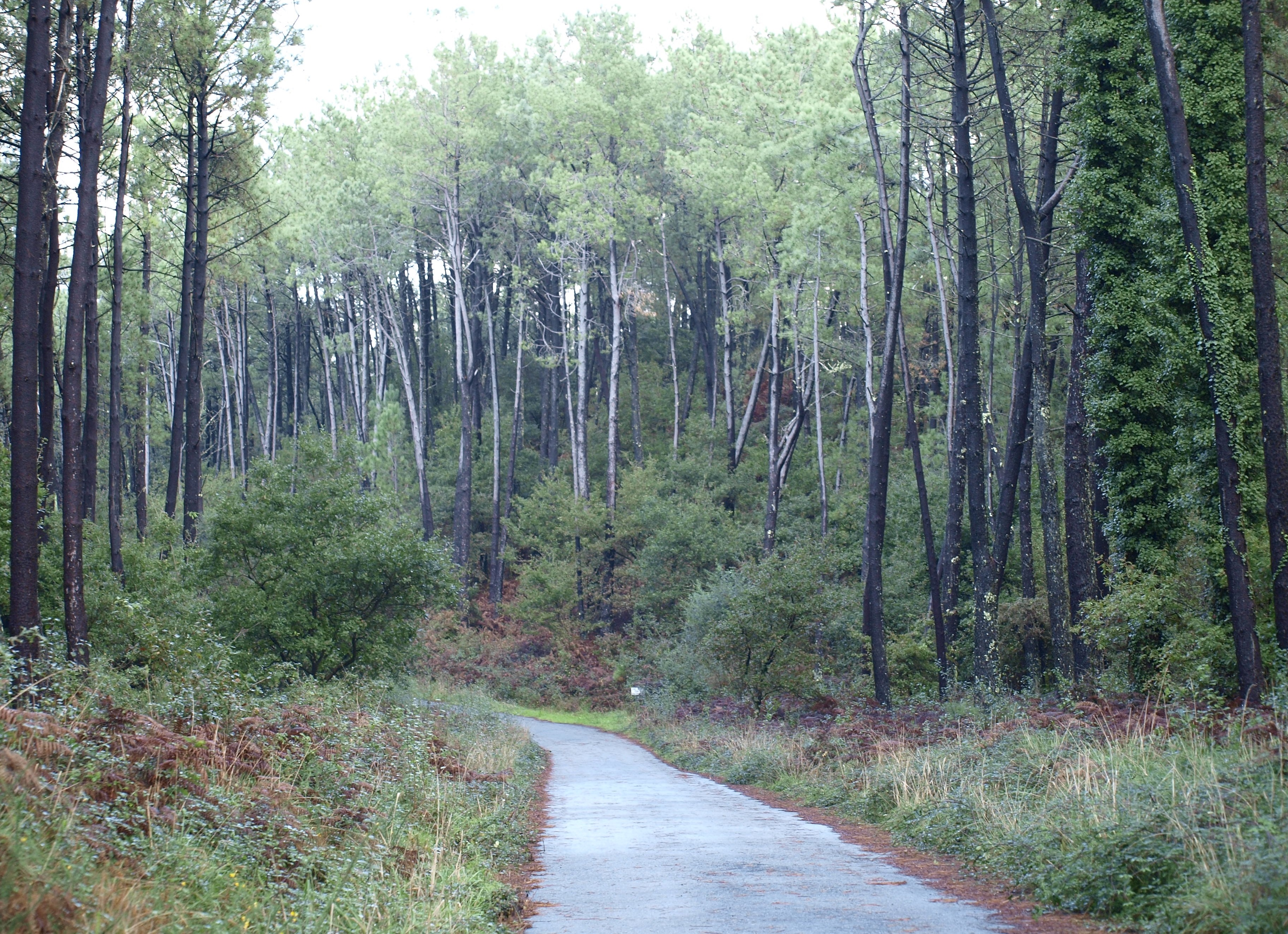 Bosque de piñeiros (Pinus pinaster) e carballos (Quercus robur) no monte Carboeiro, Dodro.